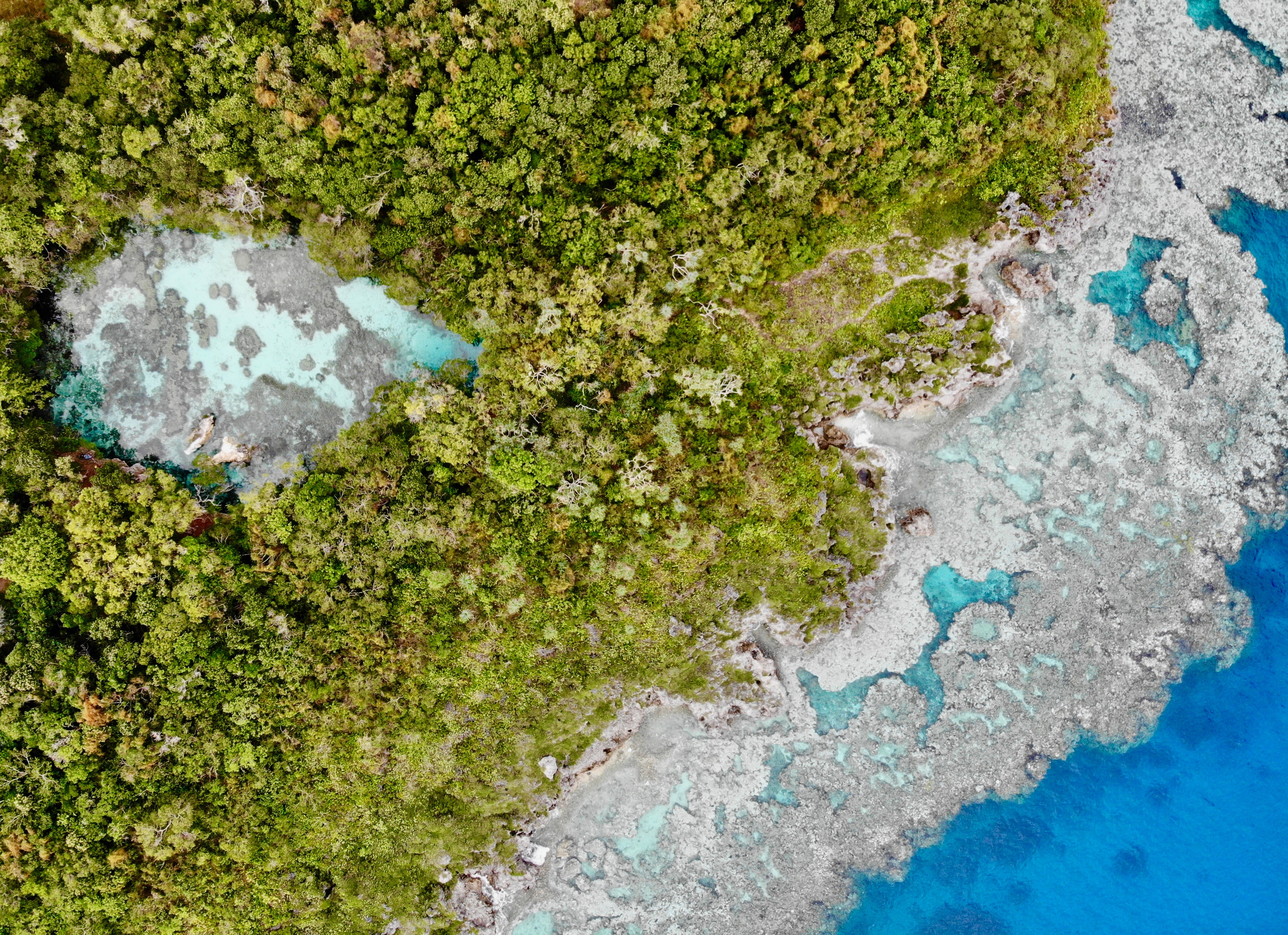 Aquarium naturel de Maré Lagon de Calédonie dans les iles Loyauté.